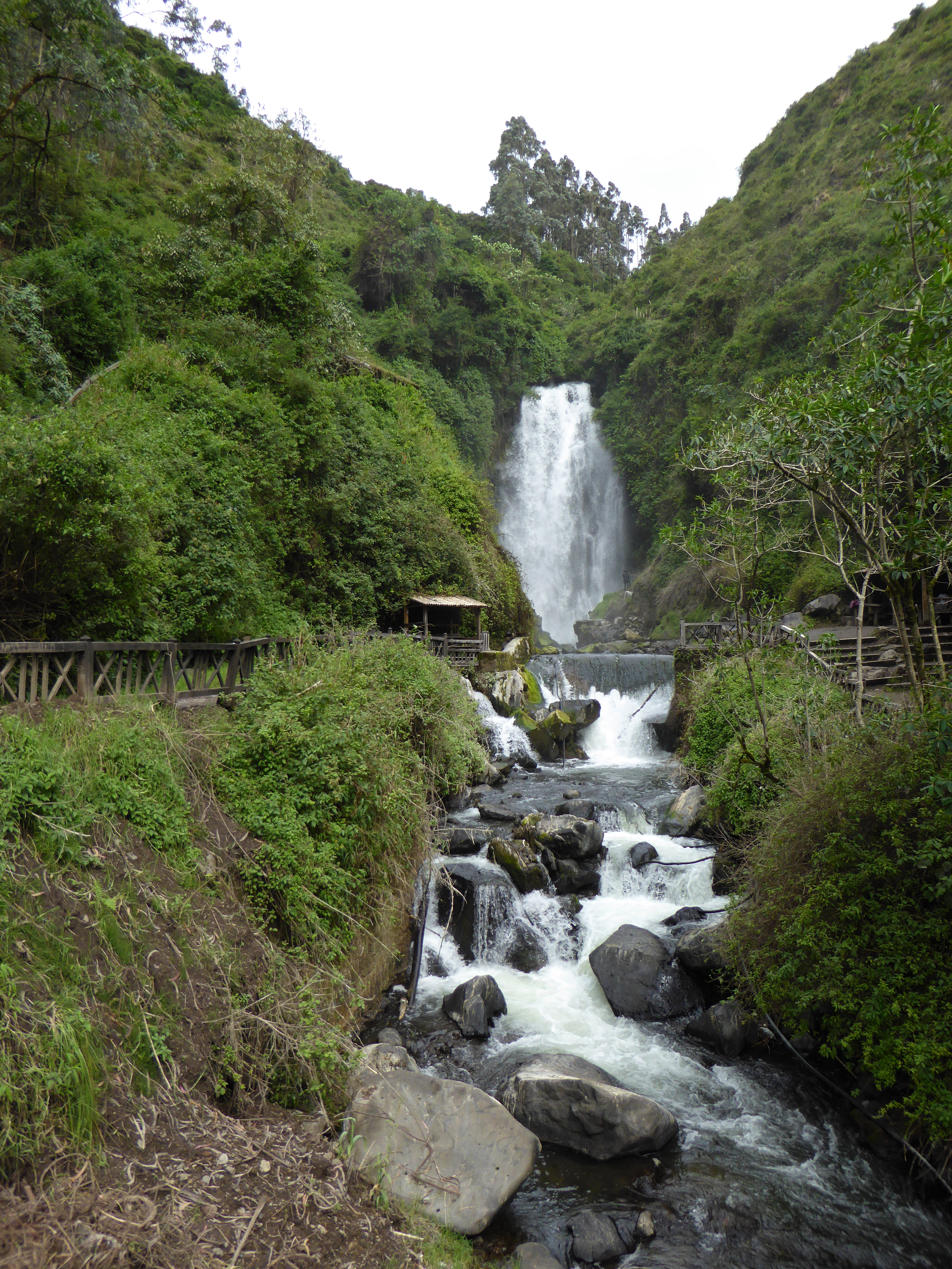 Wasserfall Cascada de Peguche